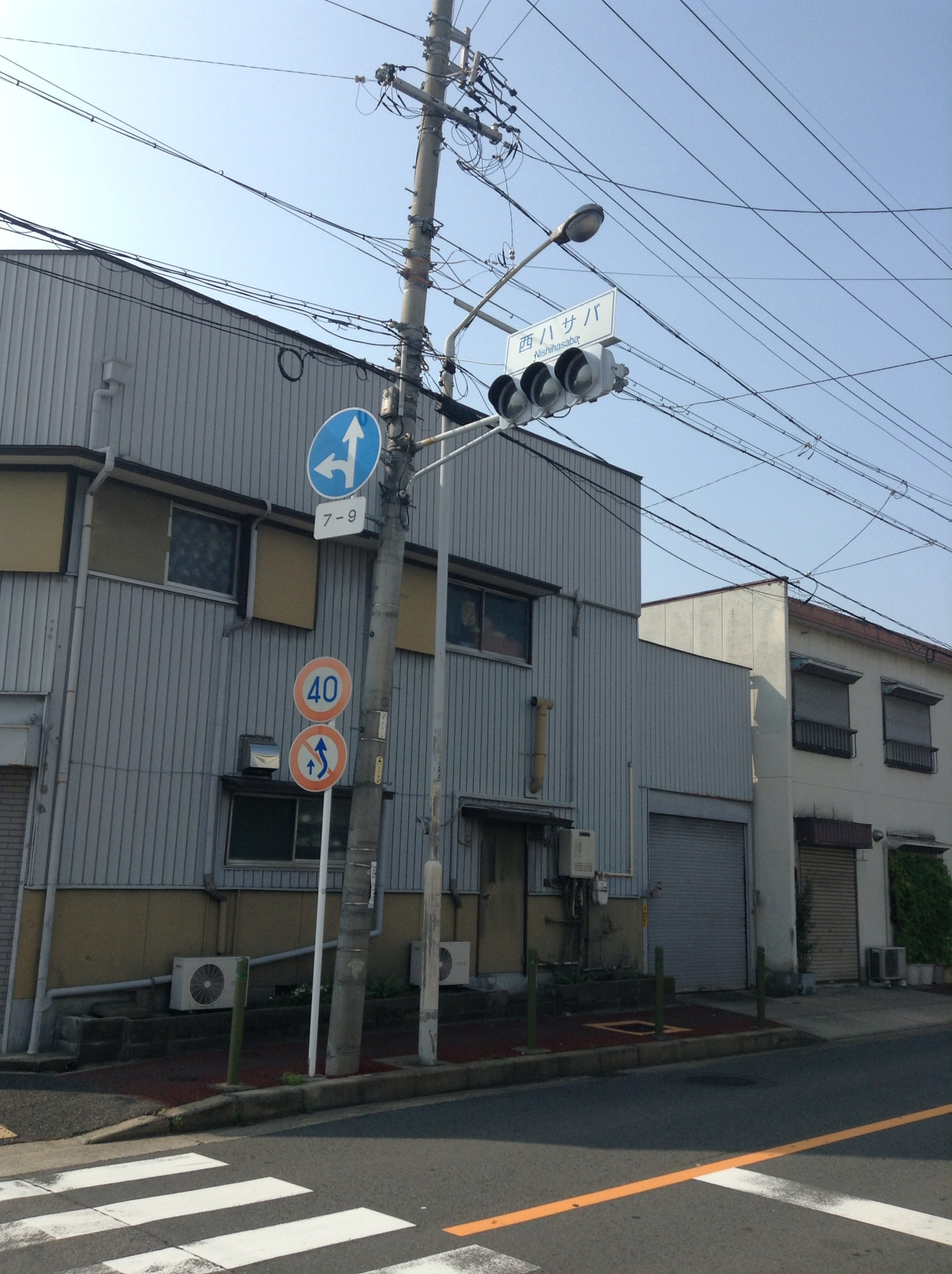 名古屋市西区と北区の区界にある西ハサバ交差点